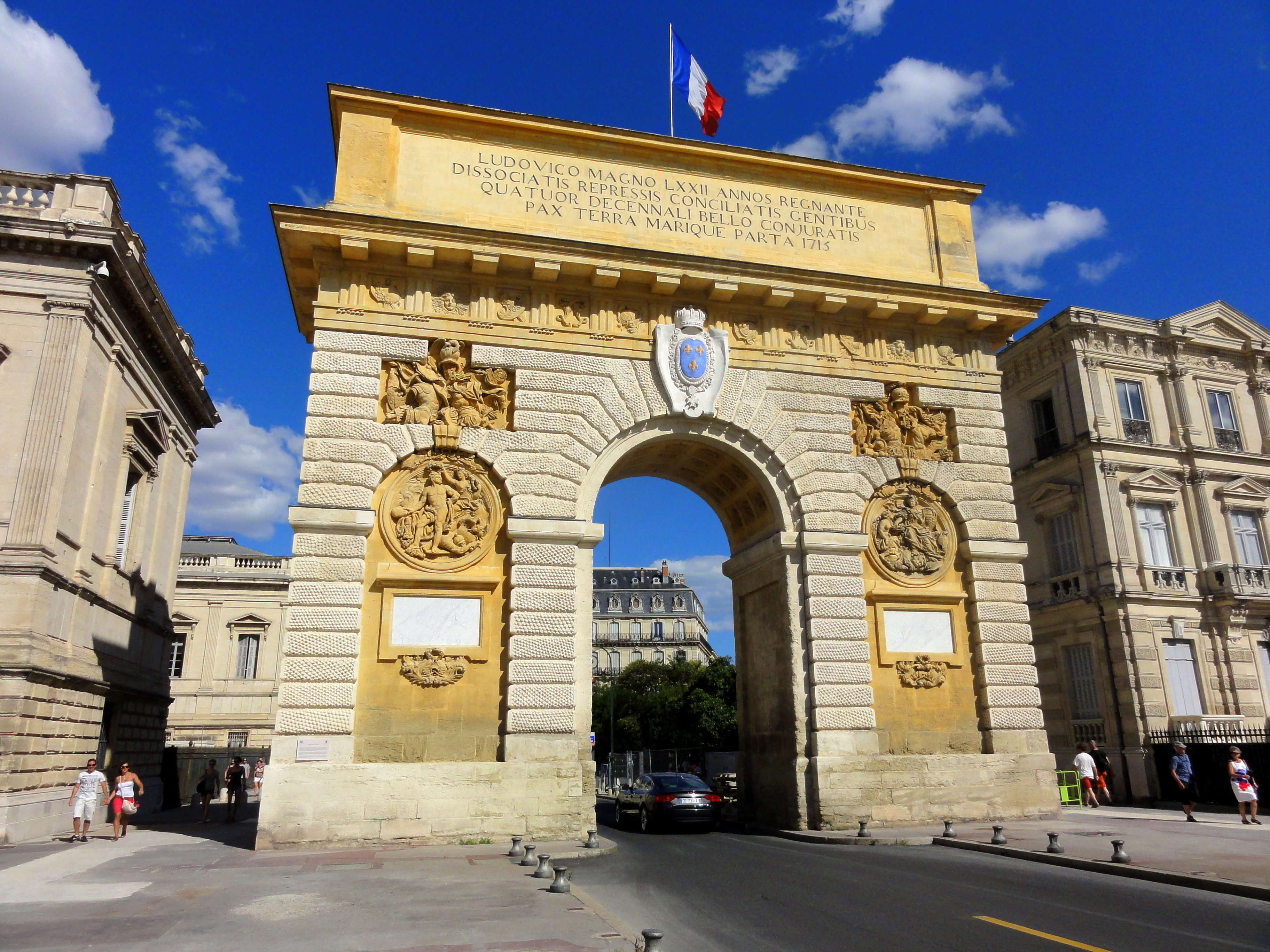 (MONTPELLIER,FR30)